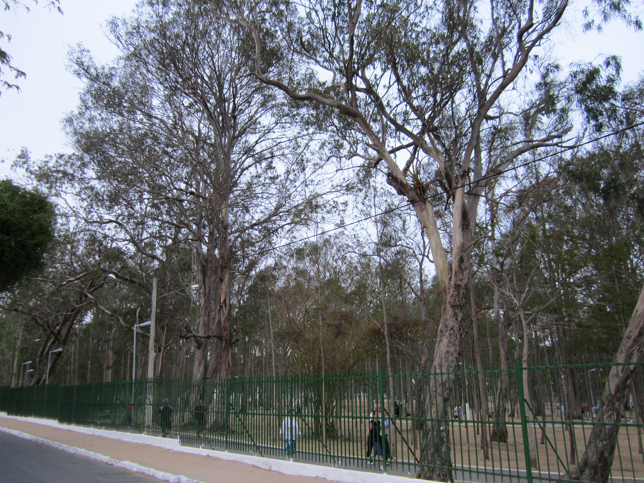 Parque Euclides Dourado (Parque dos Eucaliptos) - Garanhuns, Pernambuco, Brasil